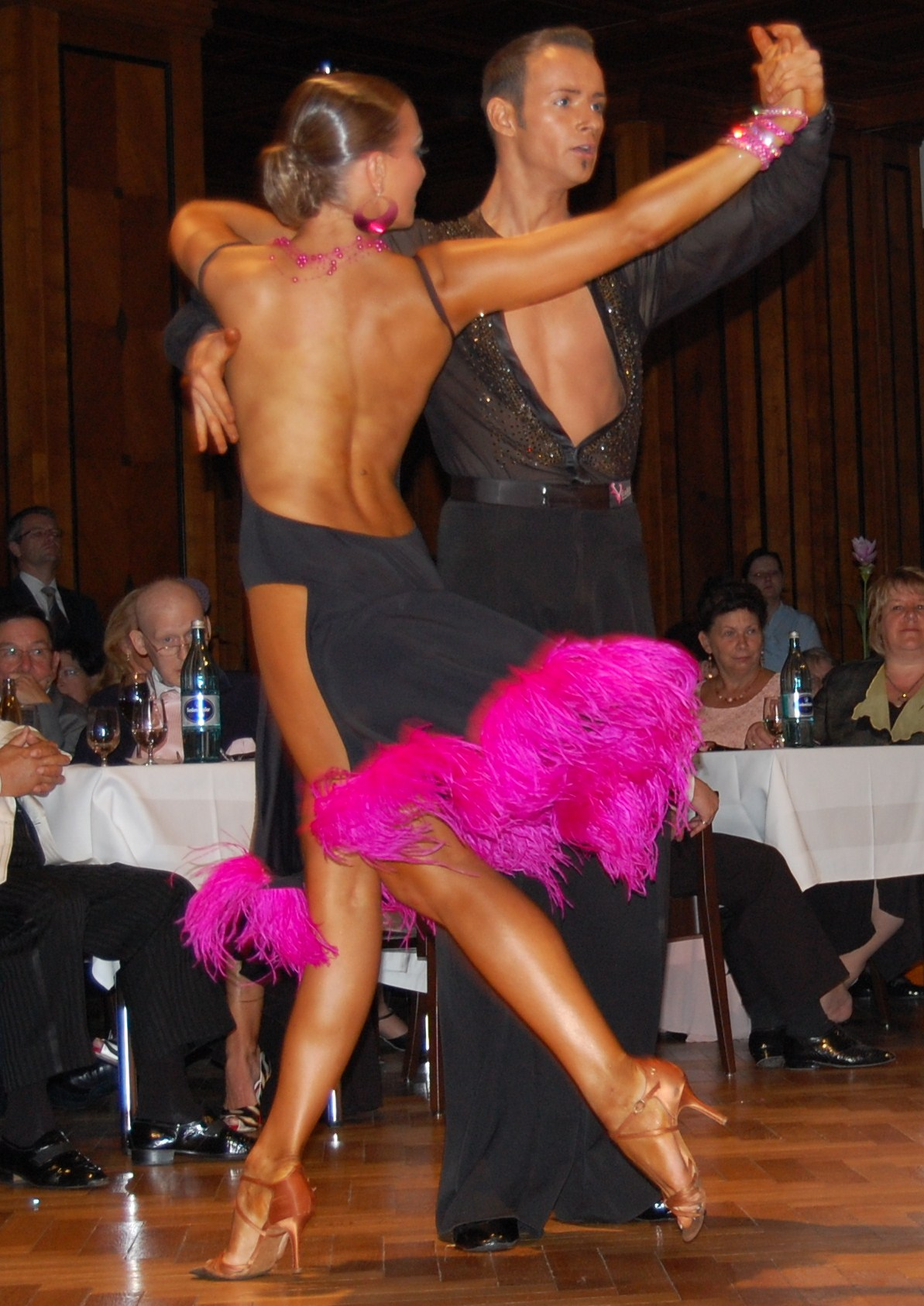 Tanzturnier für lateinamerikanische Tänze